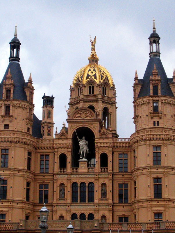 Die Fassade des Schweriner Schlosses